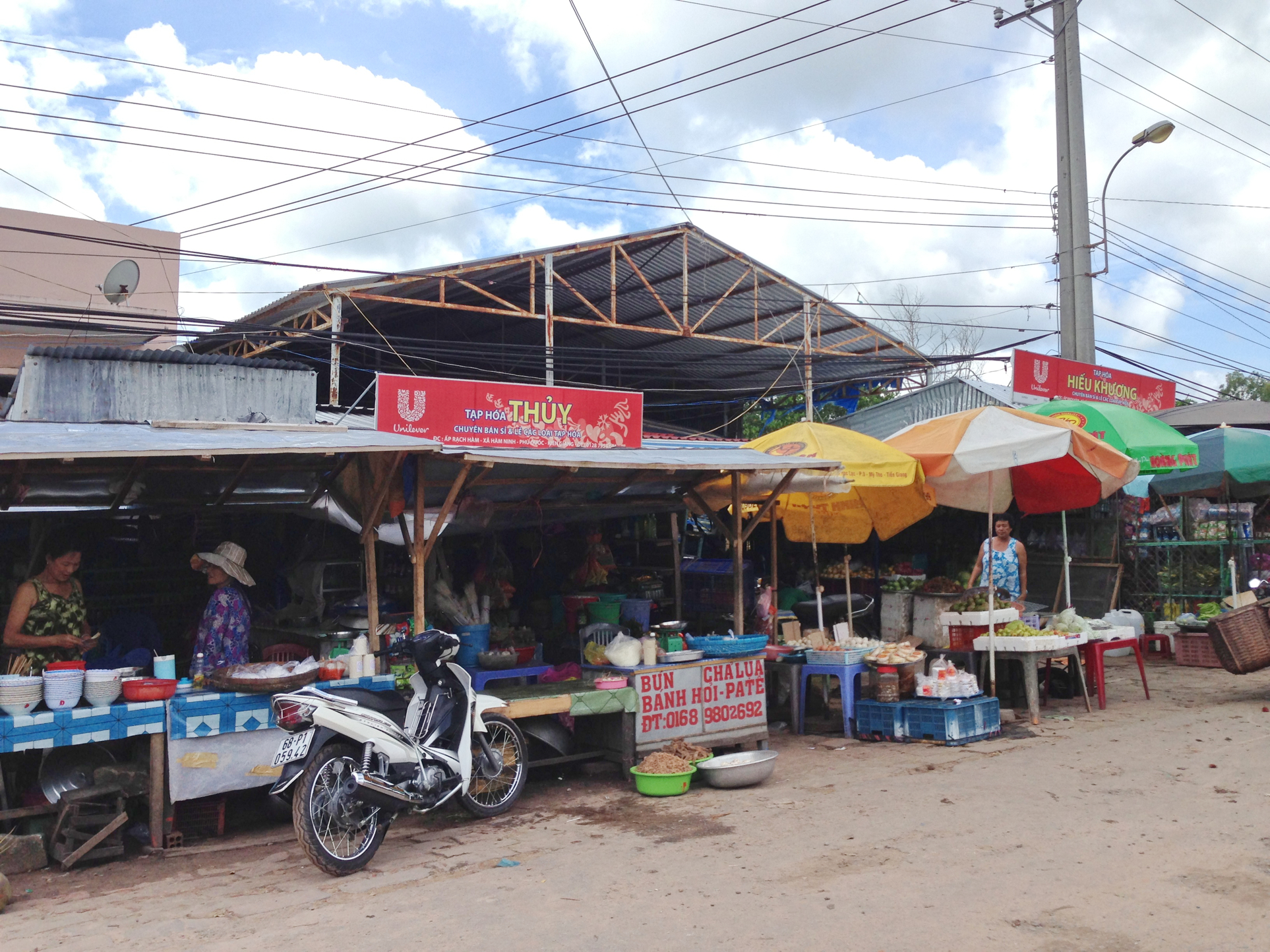 Chợ Hàm Ninh- Phú Quốc, Kiên Giang